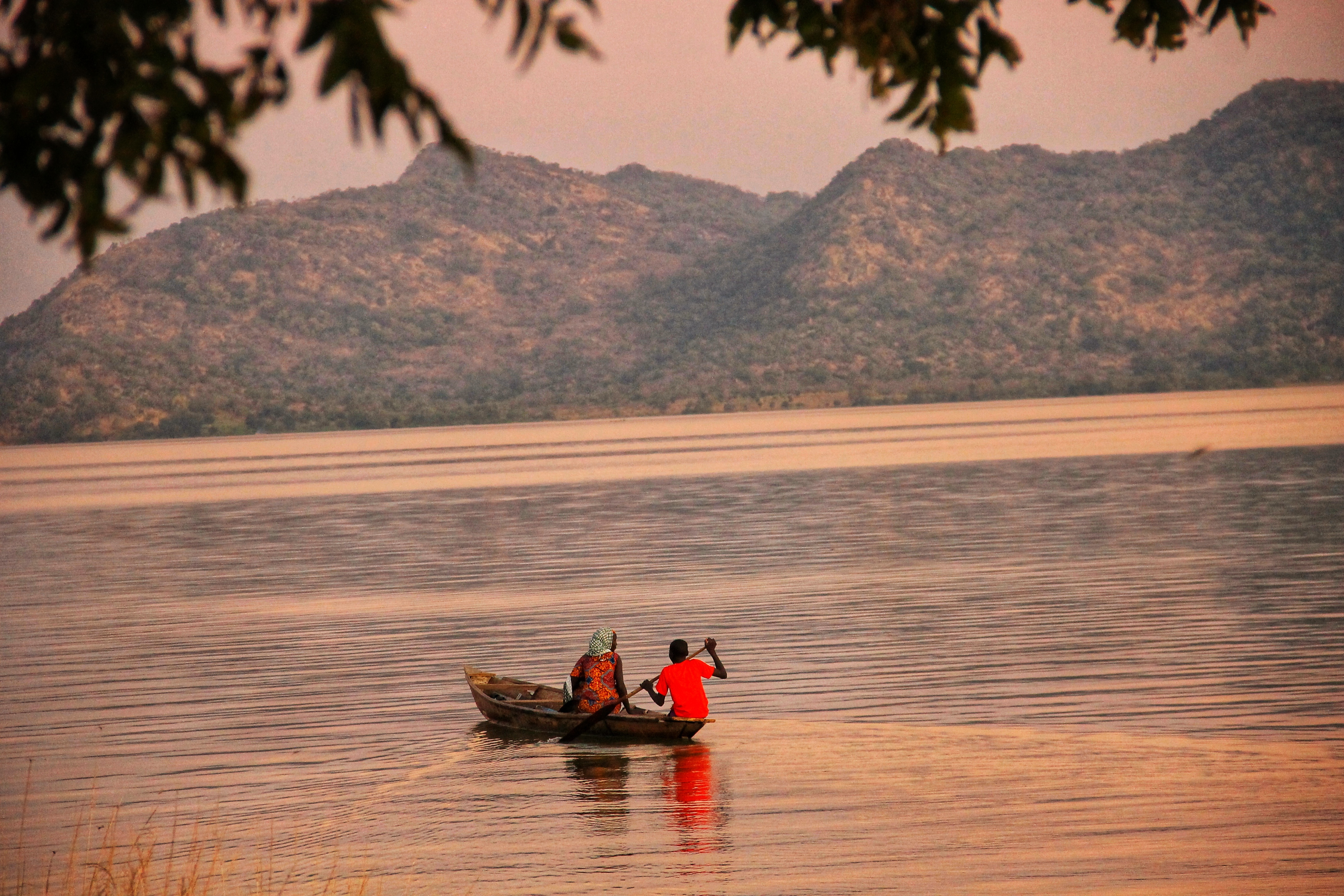 Traversée de la Bénoué par Lagdo des habitants de l'île aux damans, Nord This is an image with the theme "Africa on the Move or Transport" from: Cameroon